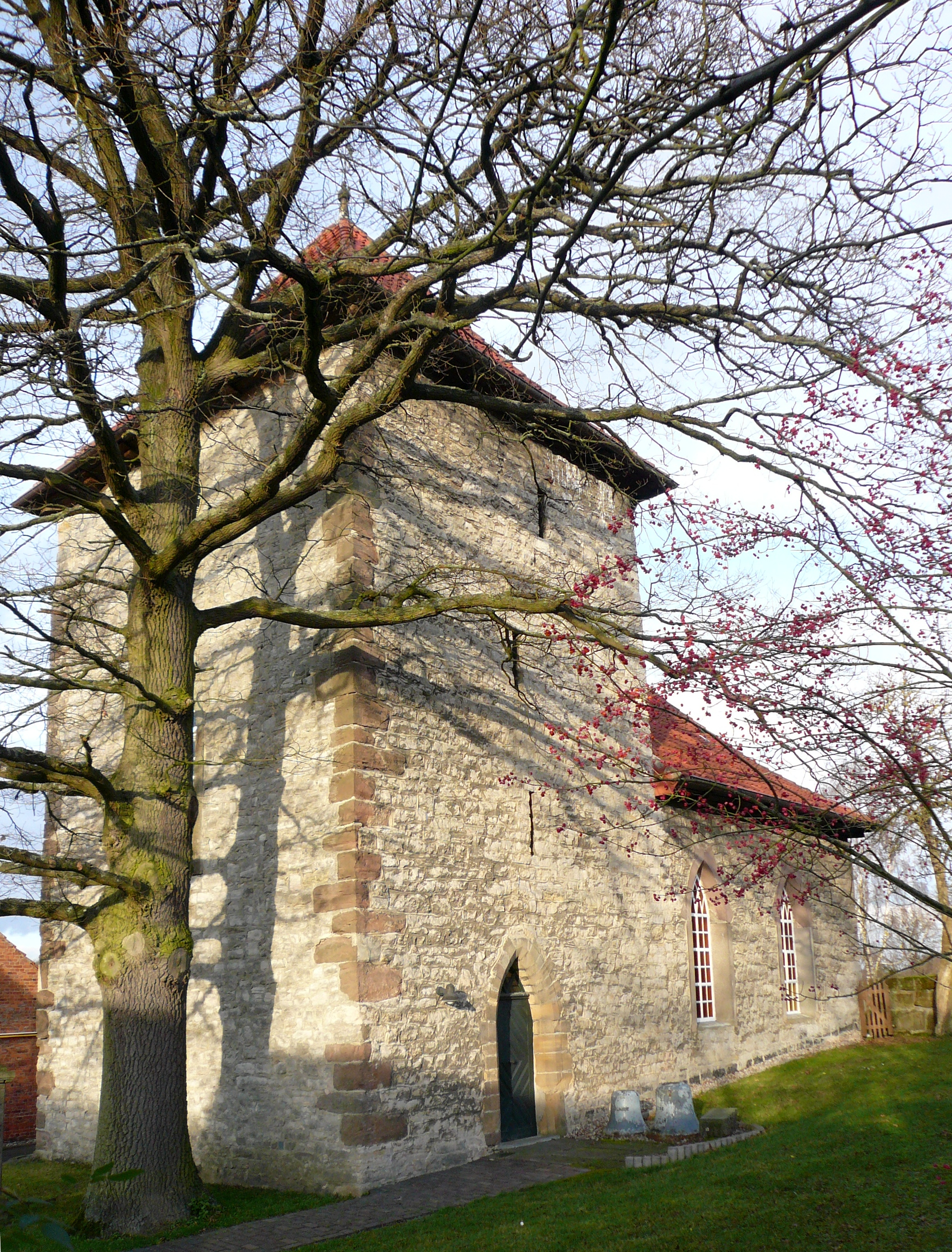 Ev.-luth. Katharinenkirche in Knutbühren, Stadt Göttingen. Angeblich 1828 erbaut, Turm jedoch offenbar mittelalterlich